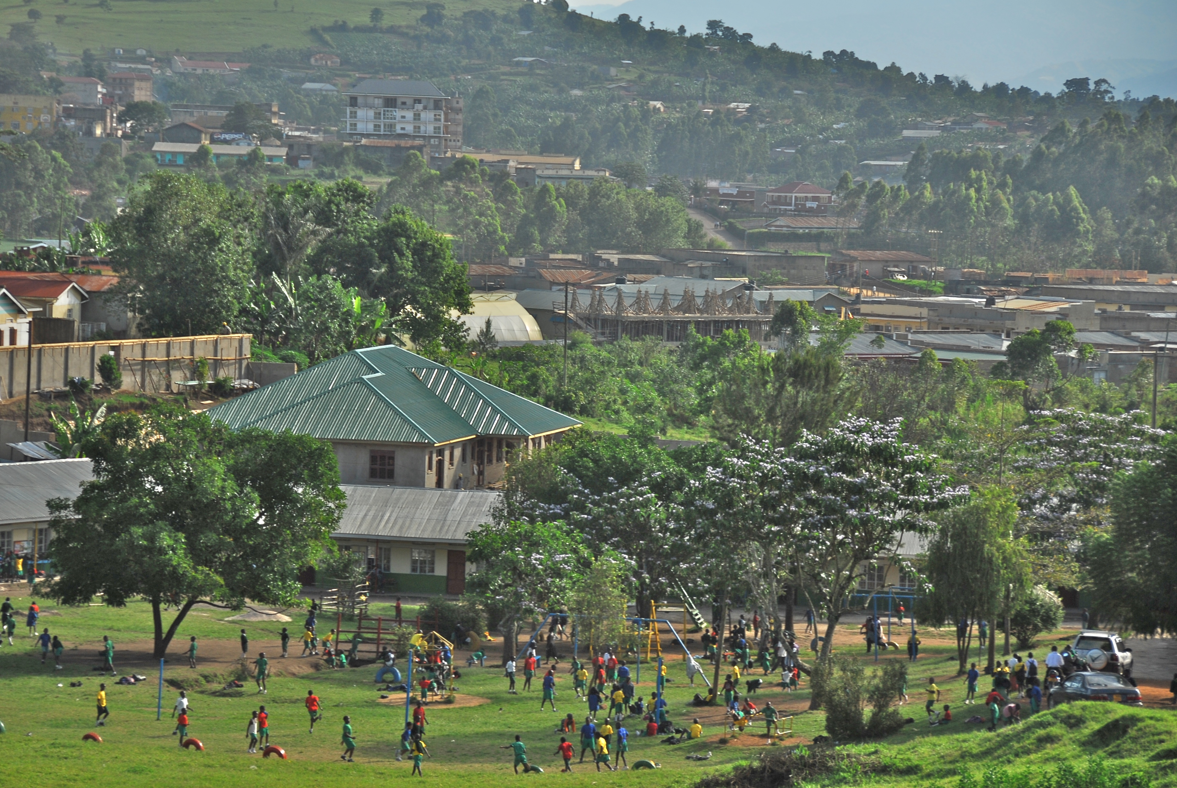 Fort Portal